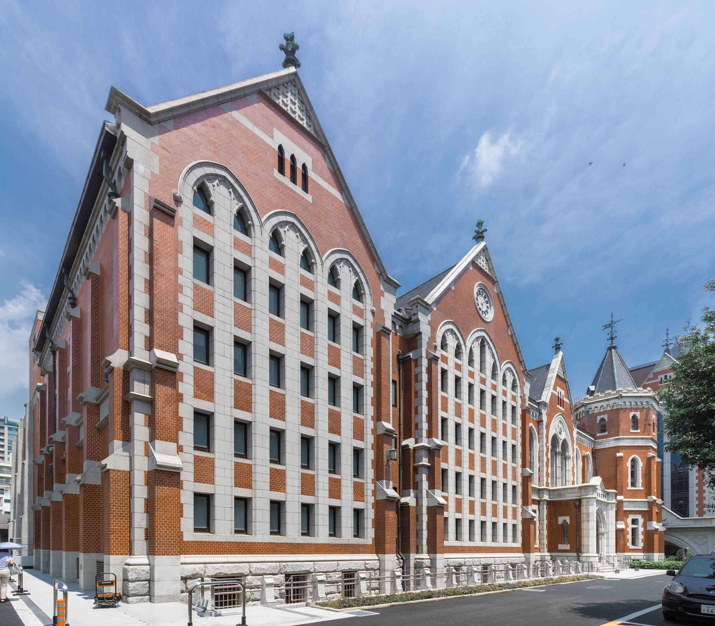 慶應義塾大学旧図書館(重要文化財)、東京都港区、曽禰達蔵設計、1912年。